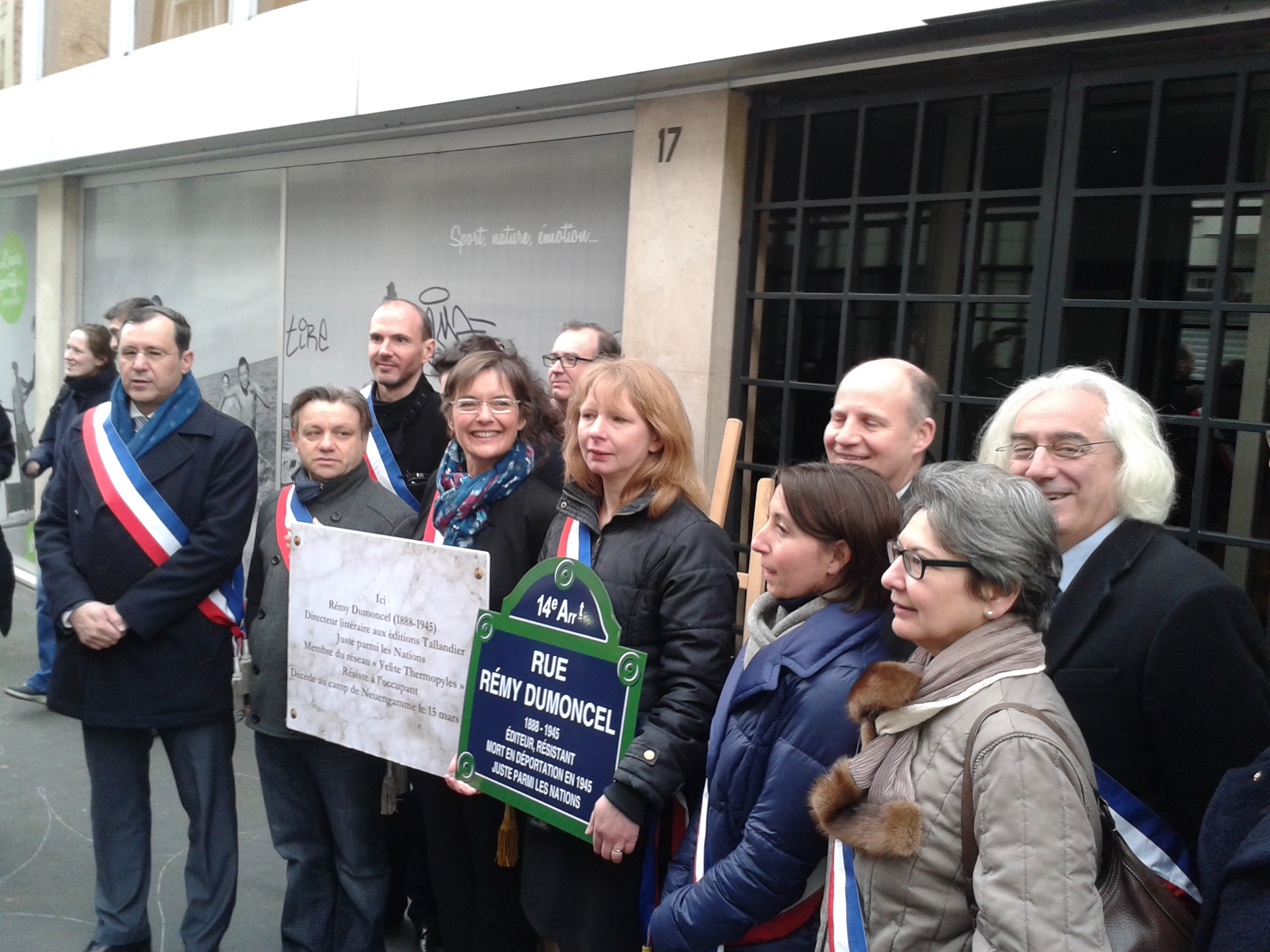 La Maire d'Avon porte la plaque de rue dont un exemplaire a été offert à la ville d'Avon. Elle est entourrée par les élus de la ville d'Avon.